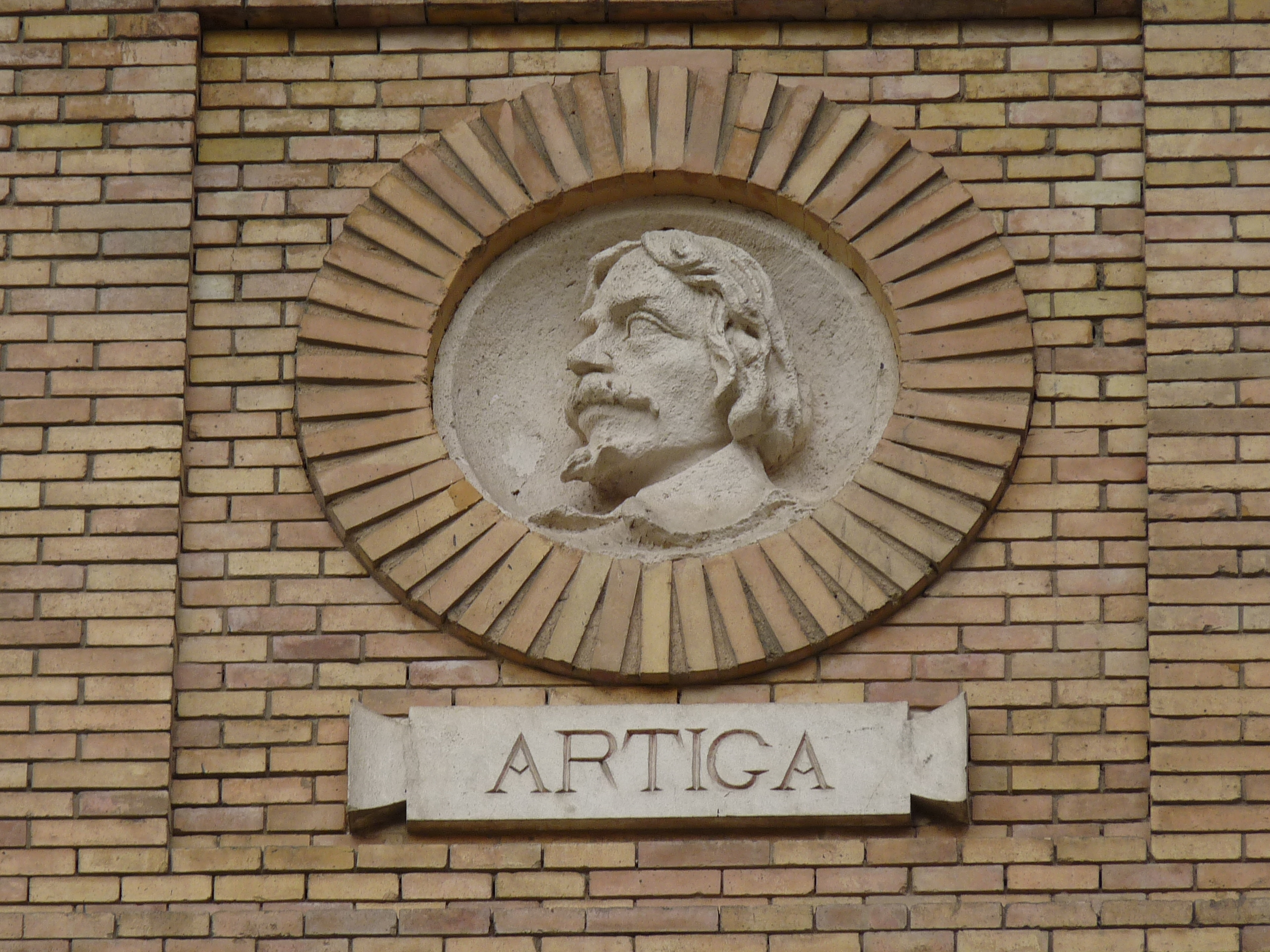 Zaragoza - Antigua Facultad de Medicina - Medallón - Francisco de Artiga